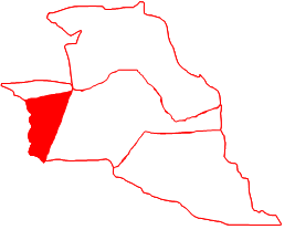 Ubicación de la parroquia Altagracia en el municipio Miranda, estado Zulia, Venezuela